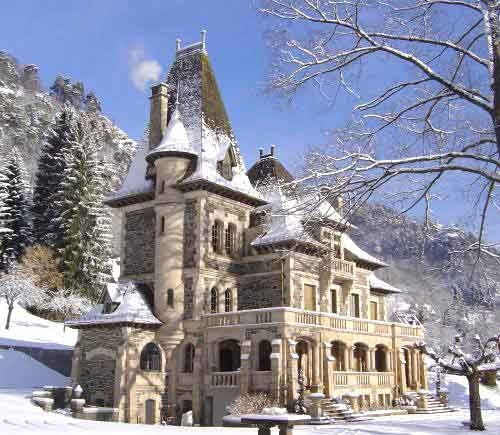 Villa des années 30, le Terrandou. Sous la neige.